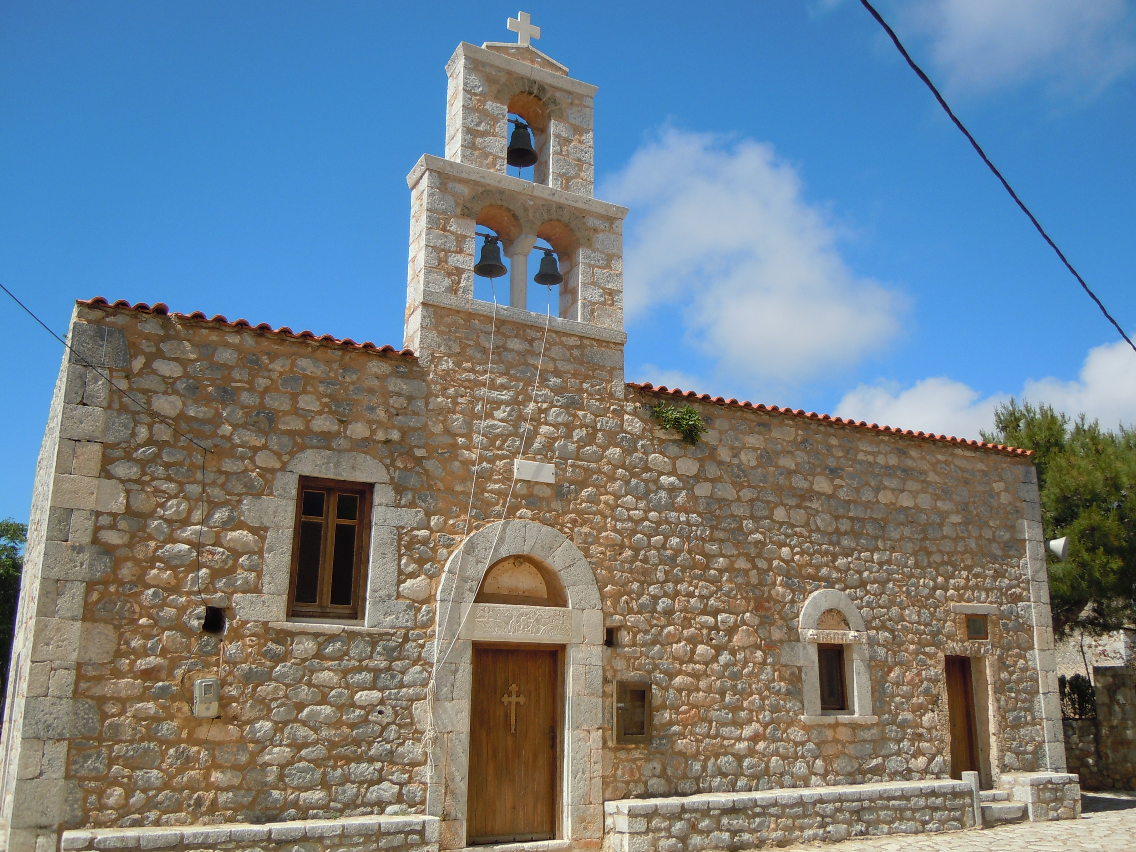 Stavri - église Agios Nikolaos, Ἁγίου Νικολάου